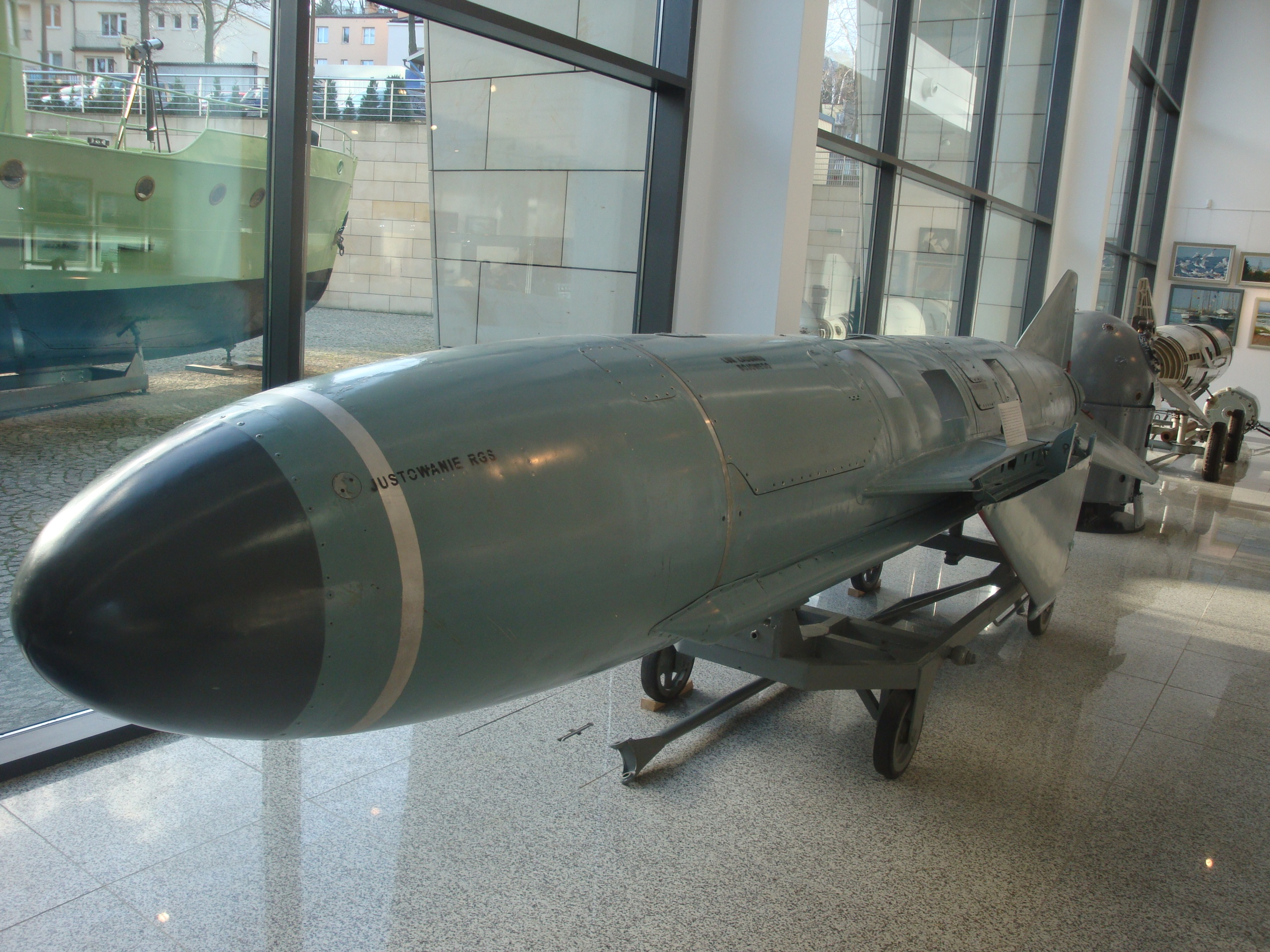 Rakieta P-21 w Muzeum Marynarki Wojennej w Gdyni